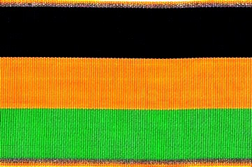 Verbindungsband der Landsmannschaft Württembergia